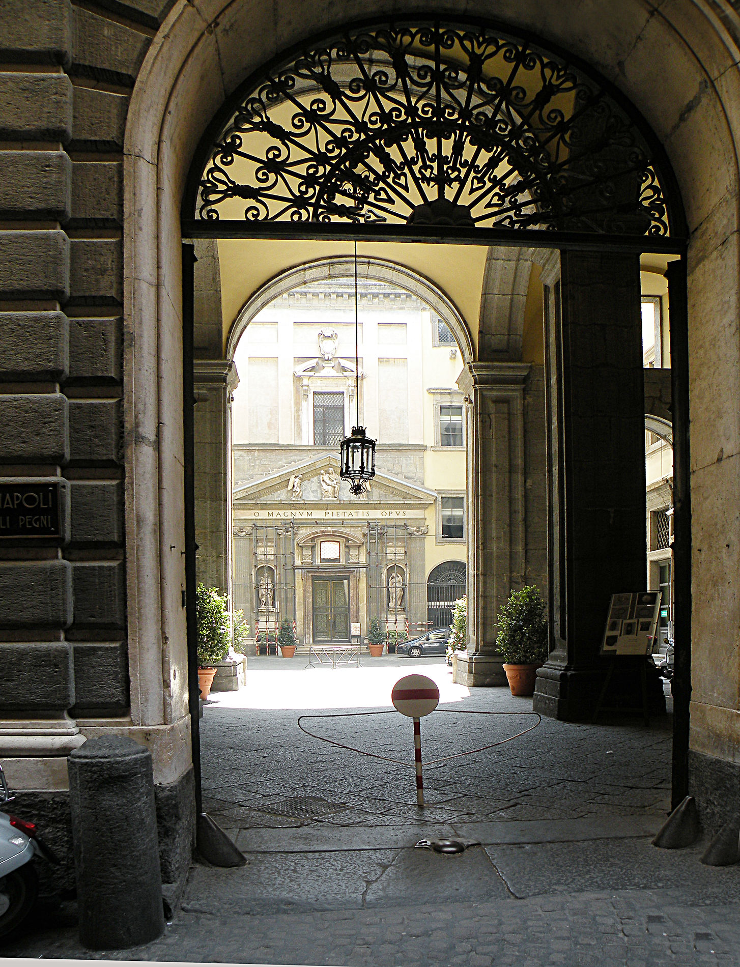 Улица в историческом центре города